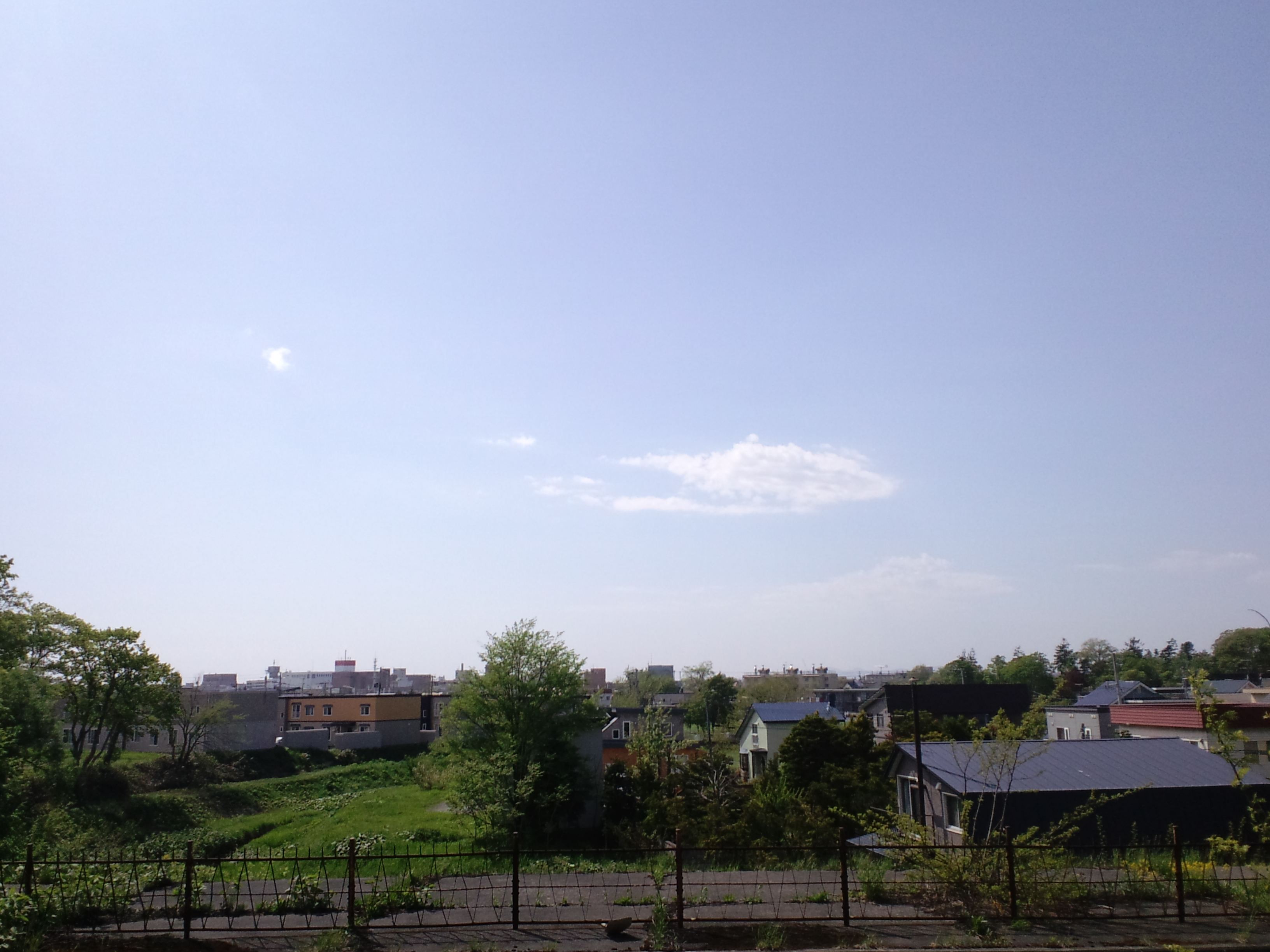 岩見沢市街地遠景